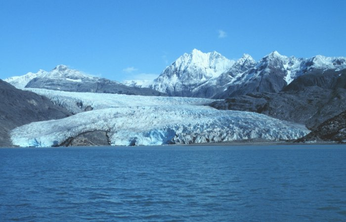 Riggs Glacier, Muir Inlet, Glacier Bay, Alaska